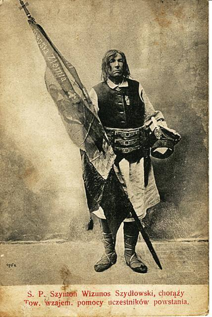 Беларуская (тарашкевіца): Сымон Шыдлоўскі (Symon Šydłoŭski) трымае харугву Віцебшчыны (Viciebsk) з Пагоняй (Pahonia)